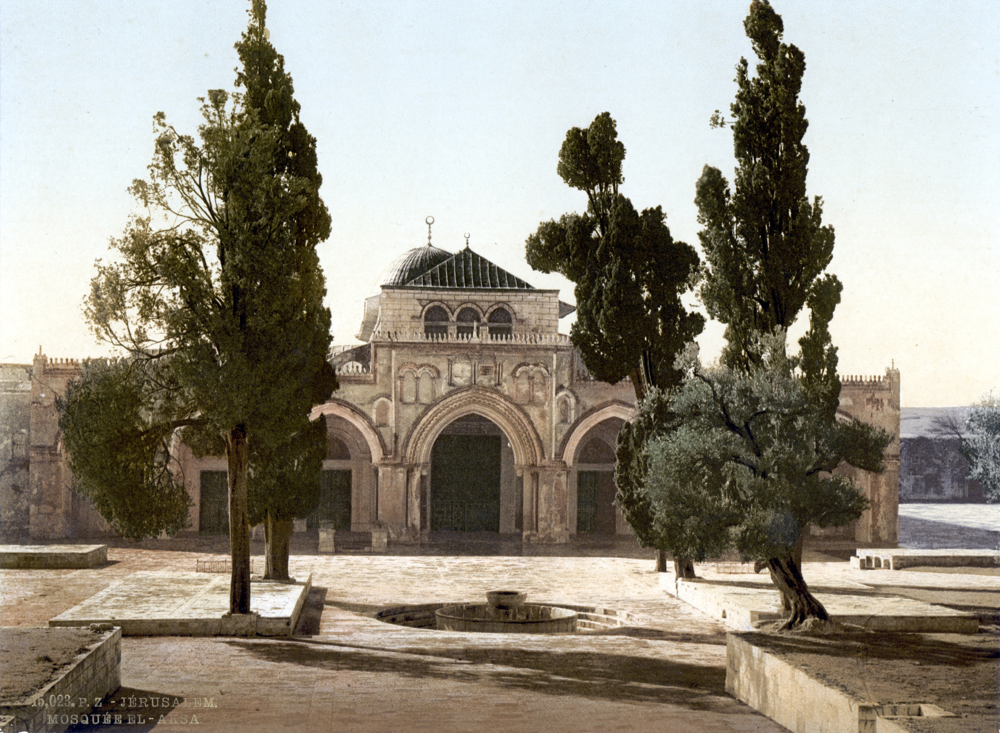 Gerusalemme, la moschea "Masjid Al-Aqsa", fra il 1890 e il 1900.